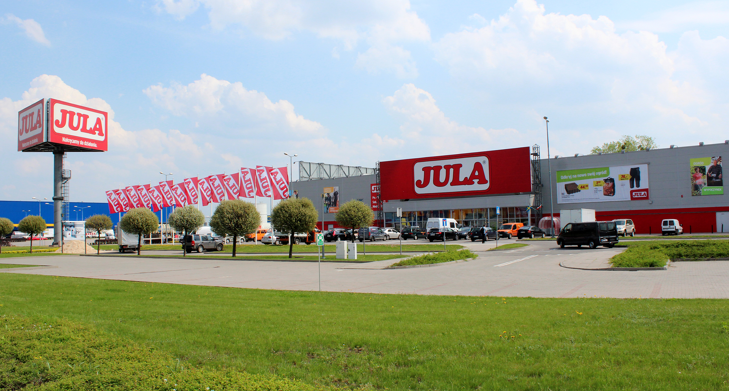 maj 2013